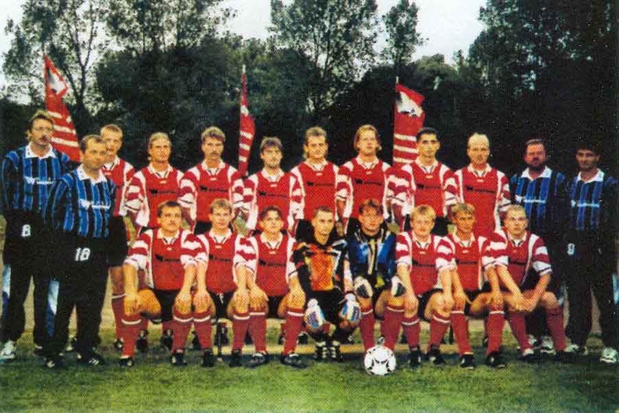 Mannschaftsbild hinten von links: Lutz Mende, Ben Sommer, Frank Schmeißer, Andreas Raß, Mike Osbach, Uwe Schladitz, Nico Nagel, Tilo Fengler, Ralf Weidner, Roland Seuß, Knut Kamann, vorn von links: Detlef Mikolajczak, Hartmut Prinz, Uwe Bertram, Steven Craatz, Ronald Kläß, Sebastian Holodziuk, Marco Haferburg, Jörg Bertram, Dennis Gottschald